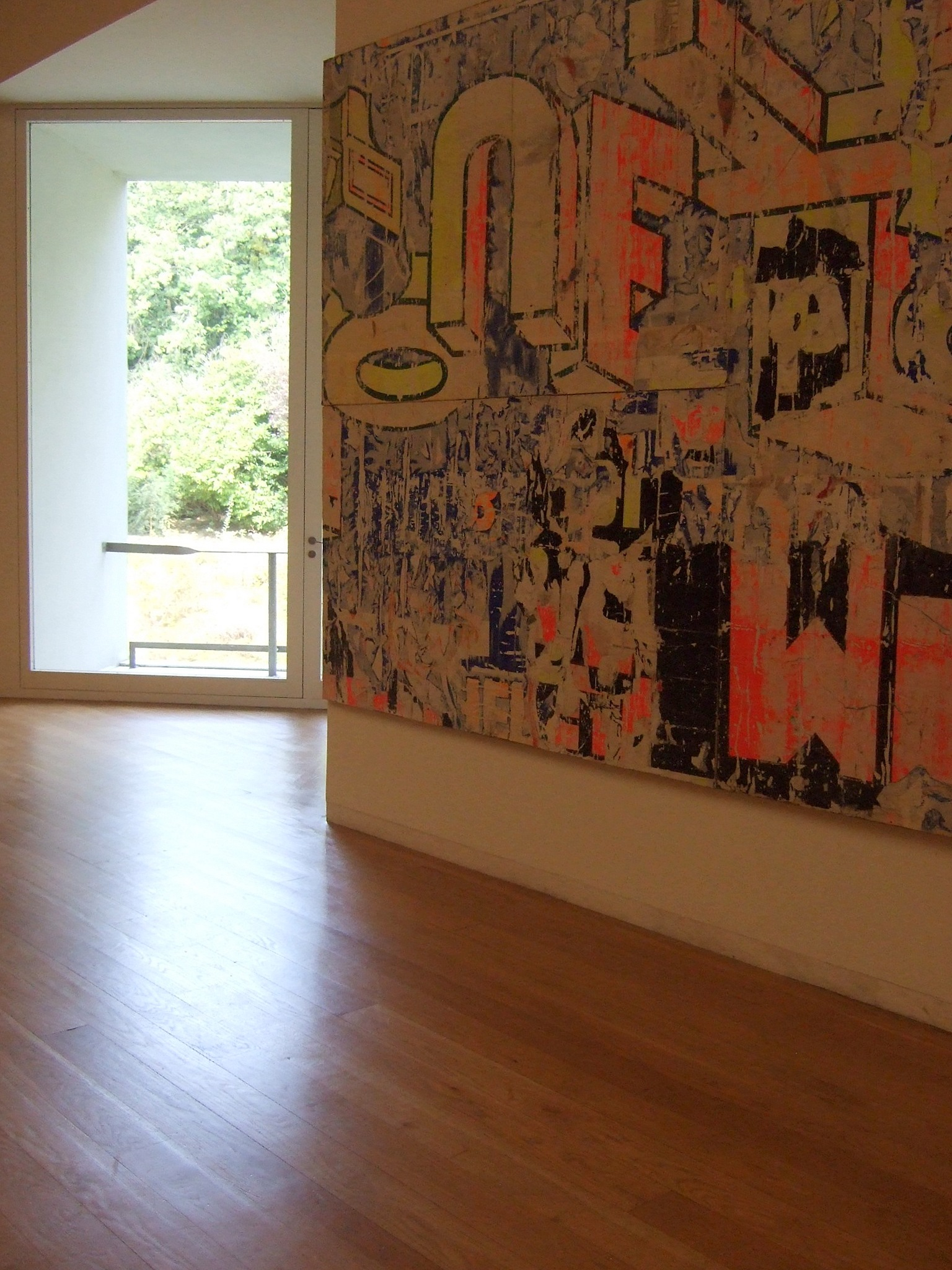 "Museu de Serralves" in Porto, Portugal